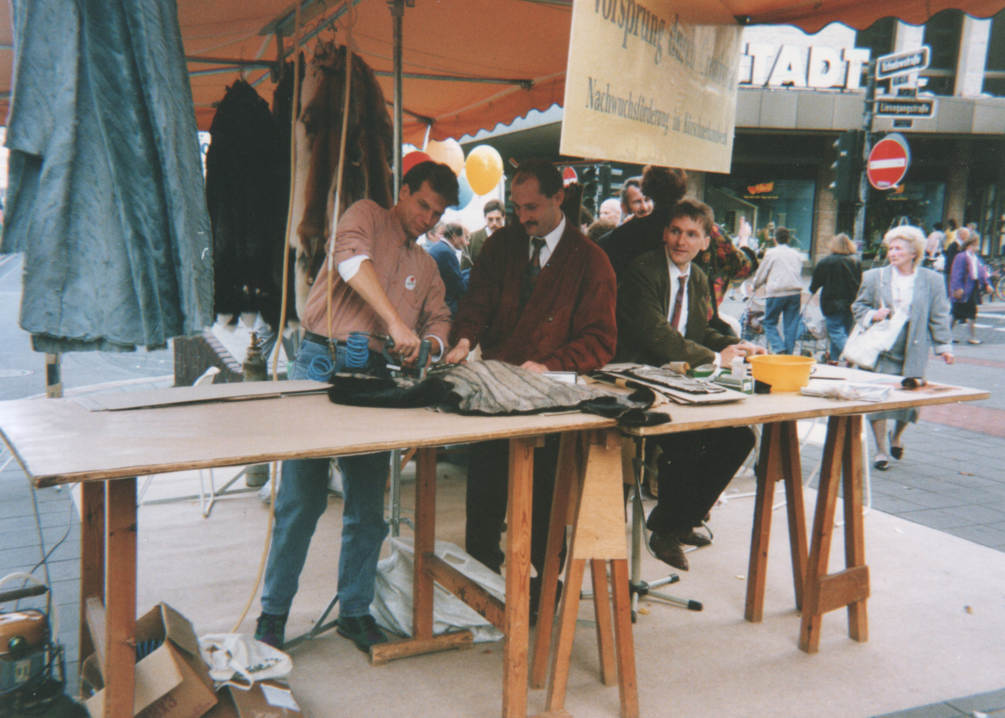 Düsseldorf, Schadowstraße, Nachwuchswerbung für Kürschner am 4. Oktober 1990 Drei Kürschnermeister beim Nerz-Auslass-Schneiden und Zwecken mit dem Presslufttacker.